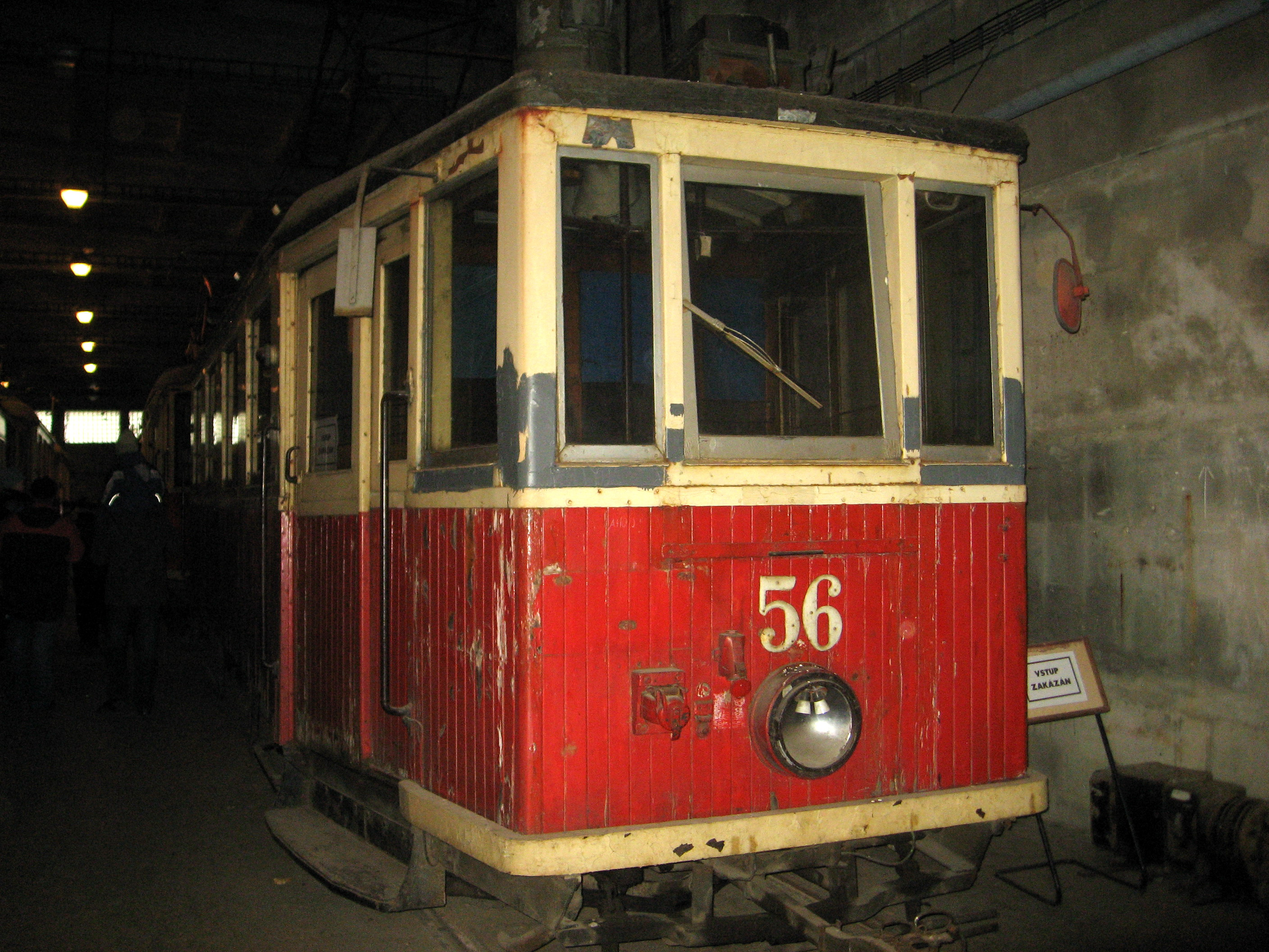 Ostravská tramvaj ev. č. 56, rok výroby 1951, výrobce Královopolská – exponát Technického muzea v Brně, depozitář MHD v Líšni